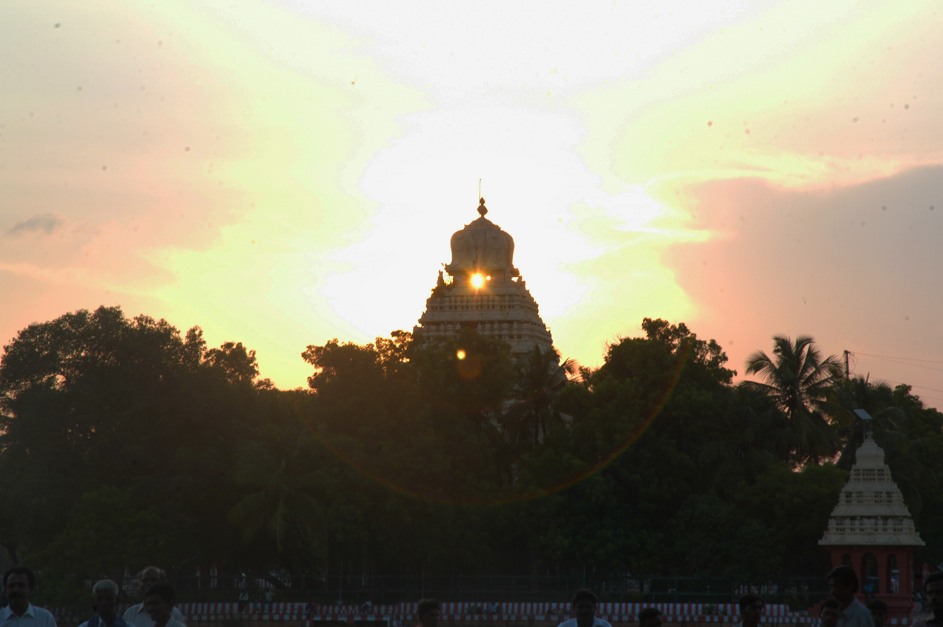 மதுரை மாரியம்மன் தெப்பக்குளம்